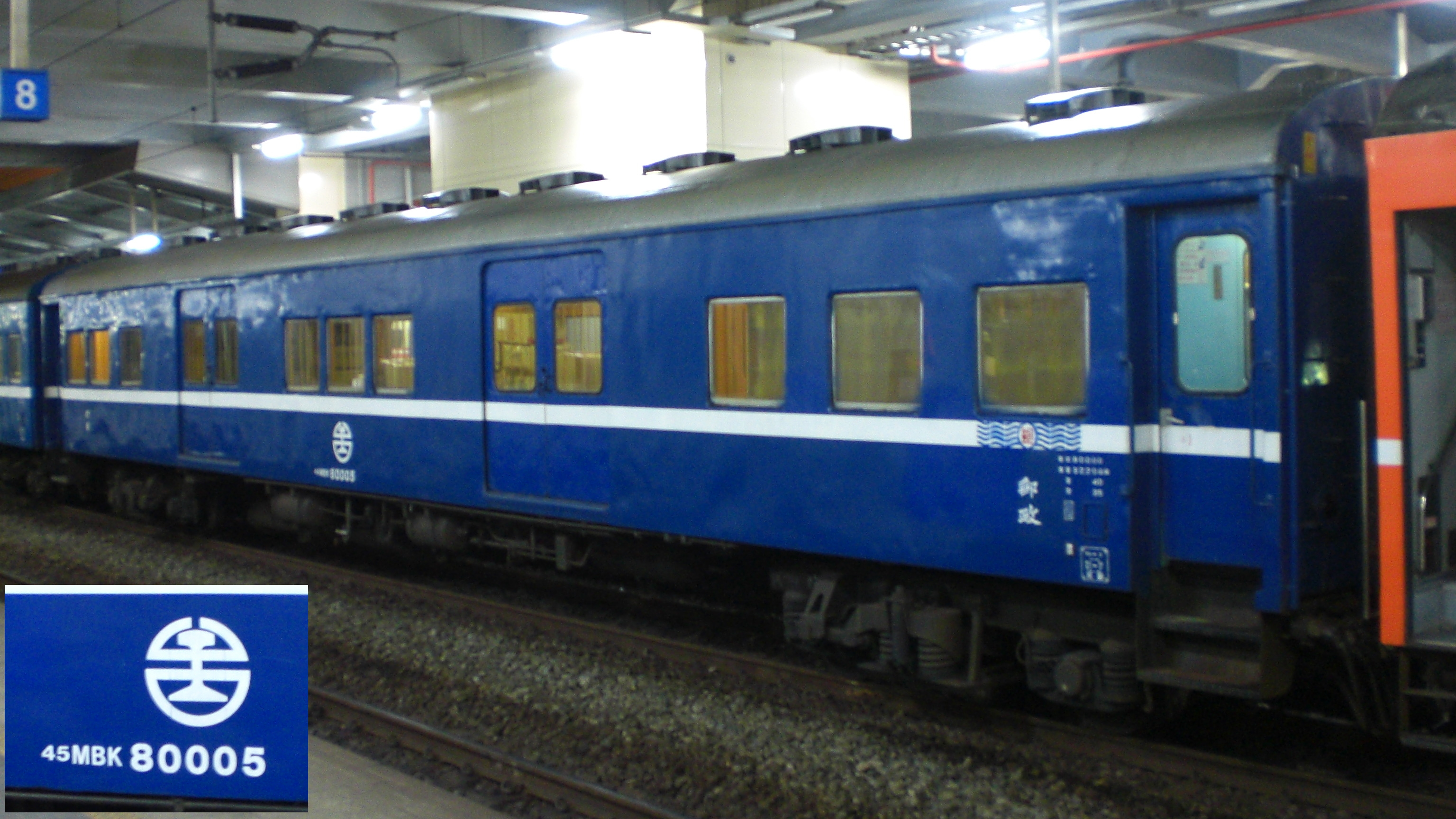 2012年12月19日，臺灣鐵路管理局郵政行李車MBK80005停靠七堵車站第二月臺。